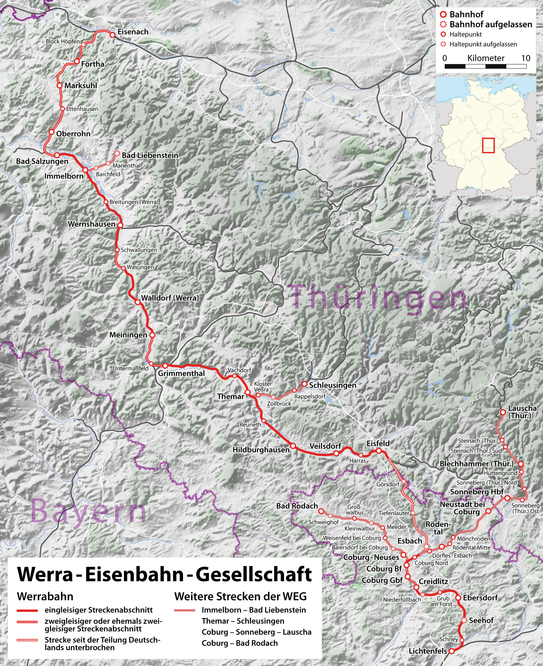 Karte der Werrabahn (Eisenach – Meiningen – Coburg – Lichtenfels)